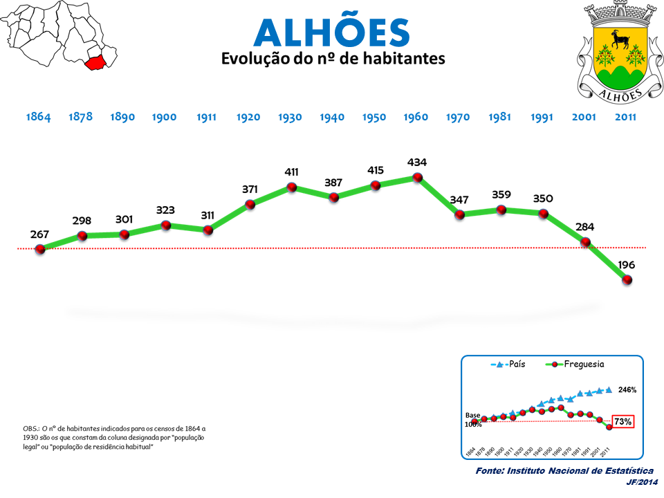 Evolução da População 1864 / 2011